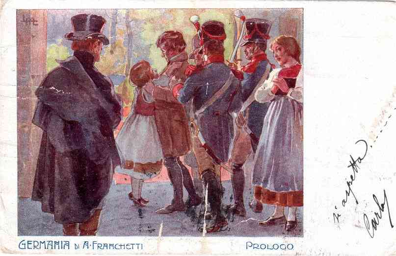 Cartolina invito alla rappresentazione dell'opera "Germania" di Alberto Franchetti - illustrazione del prologo - timbri postali: spedita da Torino il 27.10.1903 arrivata a Palermo il 29.10.1903